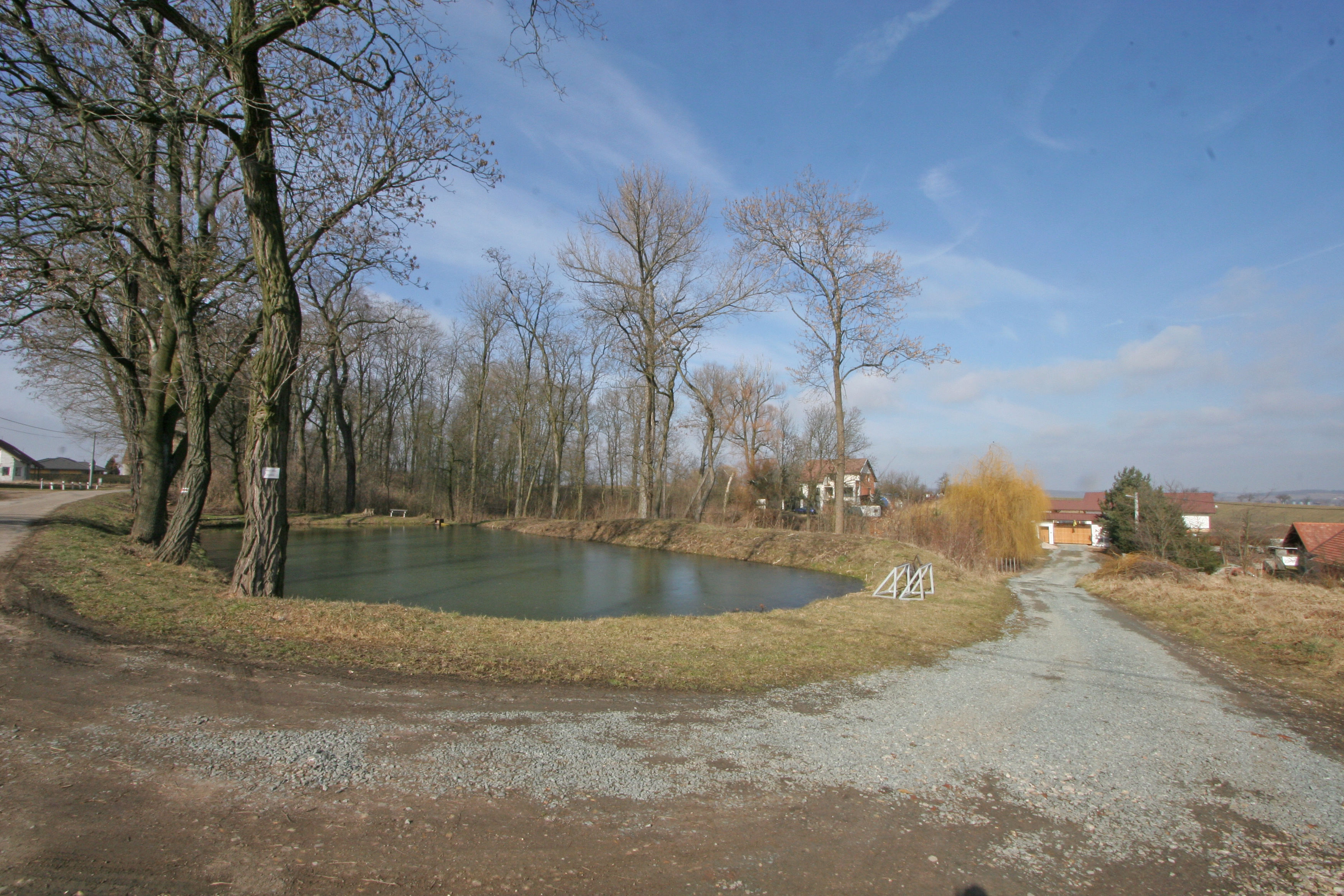 Polizy rybníček